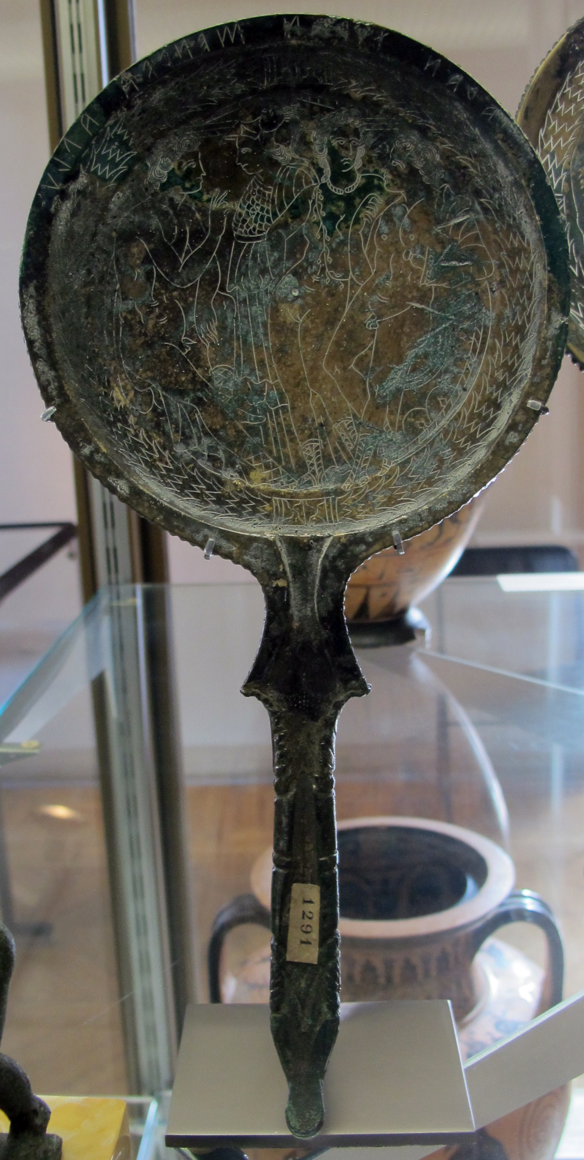 Arte etrusca, specchio con turan e minerva tra laran e aplu, 300 ac. ca